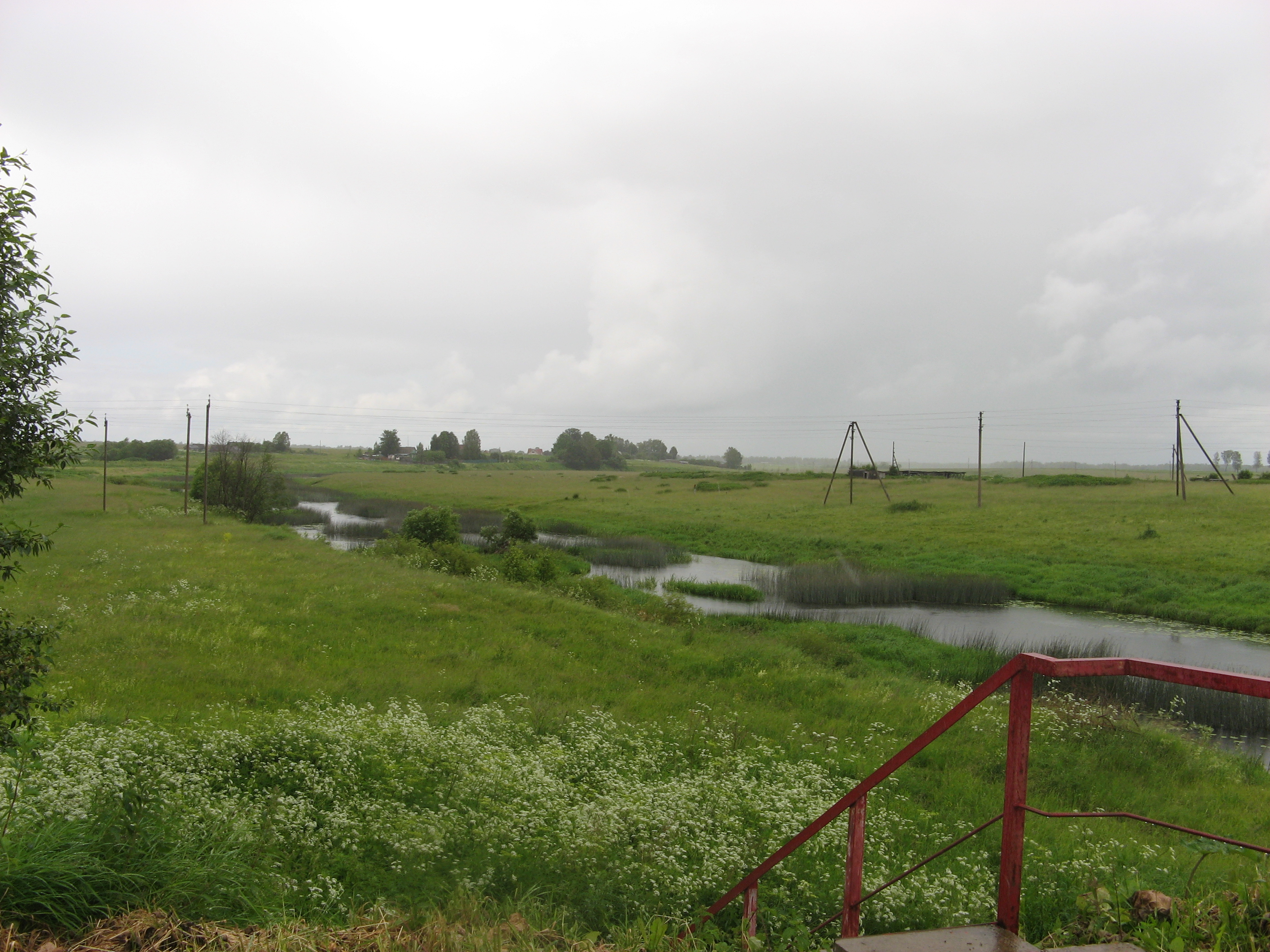 река Касня в селе Тесово Новодугинского района.